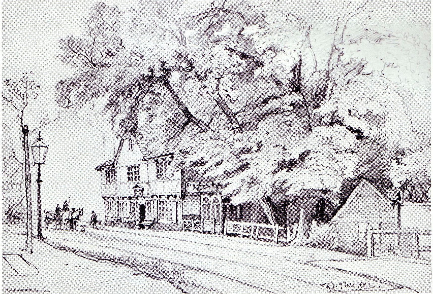 gasthof schinkenkrug in hamburg-hamm 9. Juli 1881 Bleistiftzeichnung von Johann Theobald Riefesell (1836-1895)